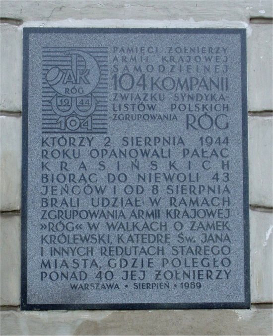 Na ścianie pałacu Krasińskich w Warszawie (fot Zu)